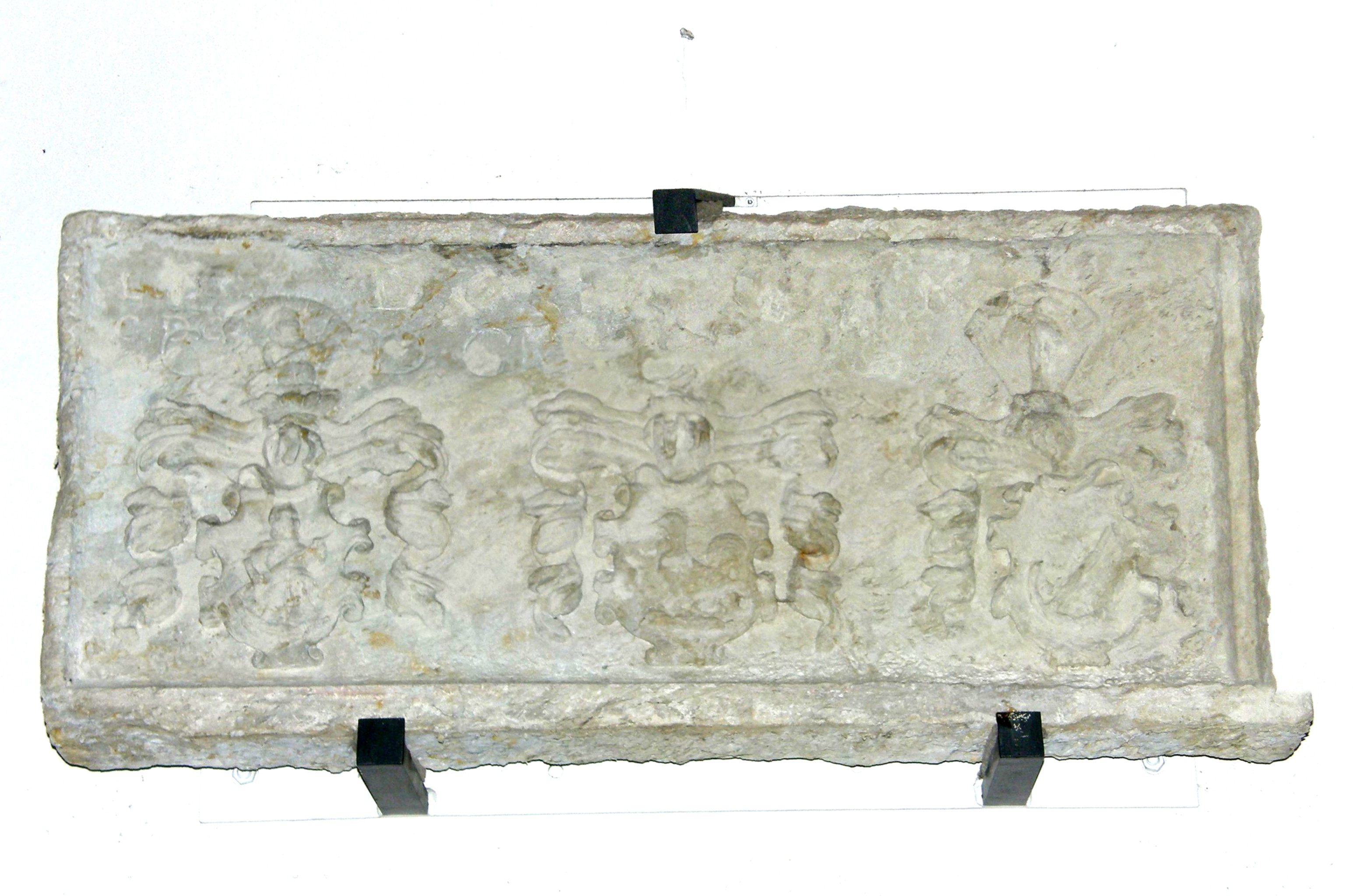 Berlin-Mahlsdorf, Hönower Str., alte Pfarrkirche, innen; Epitaph